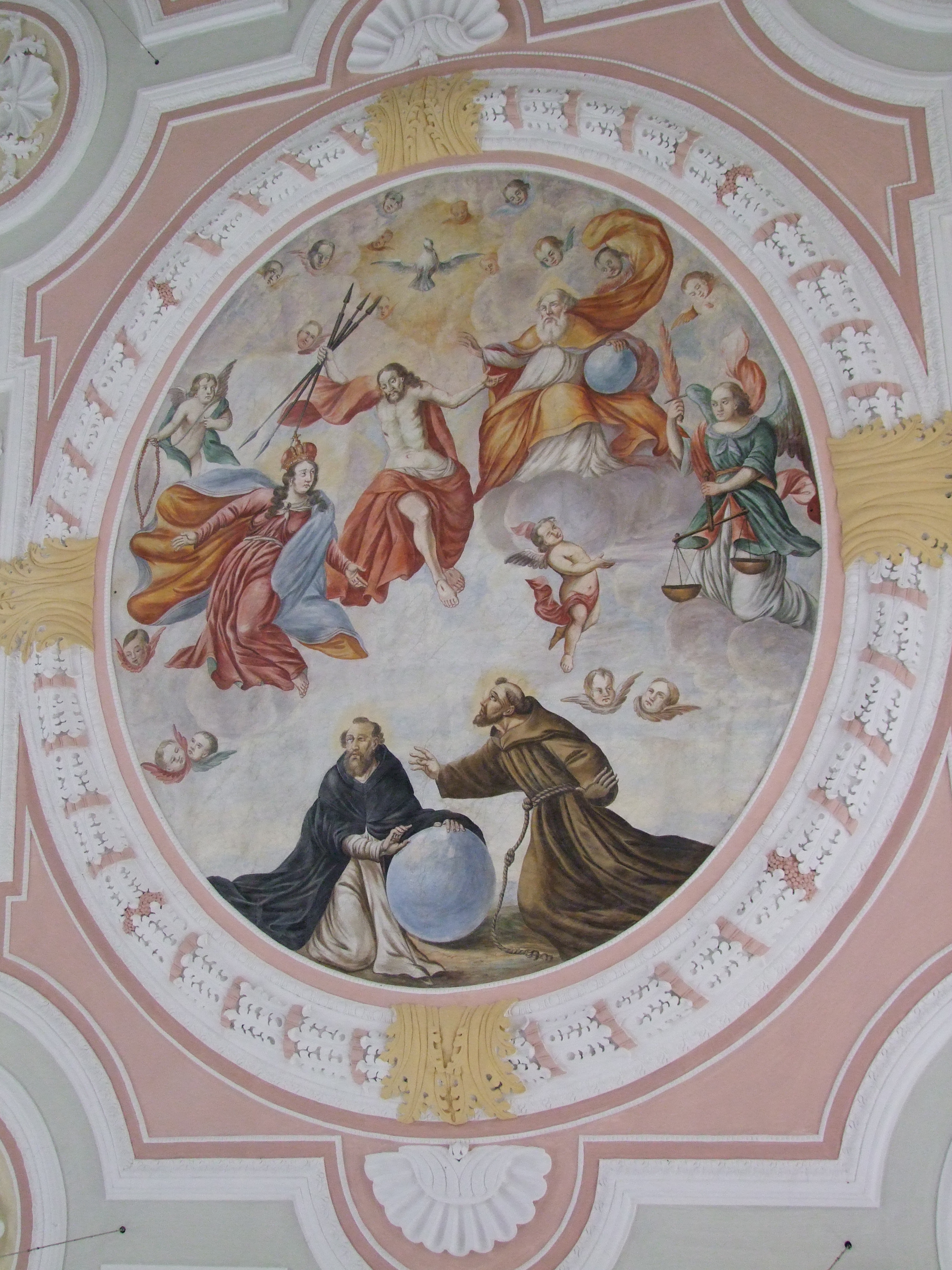 St. Martin im oberschwäbischen Tussenhausen in Bayern/Schwaben